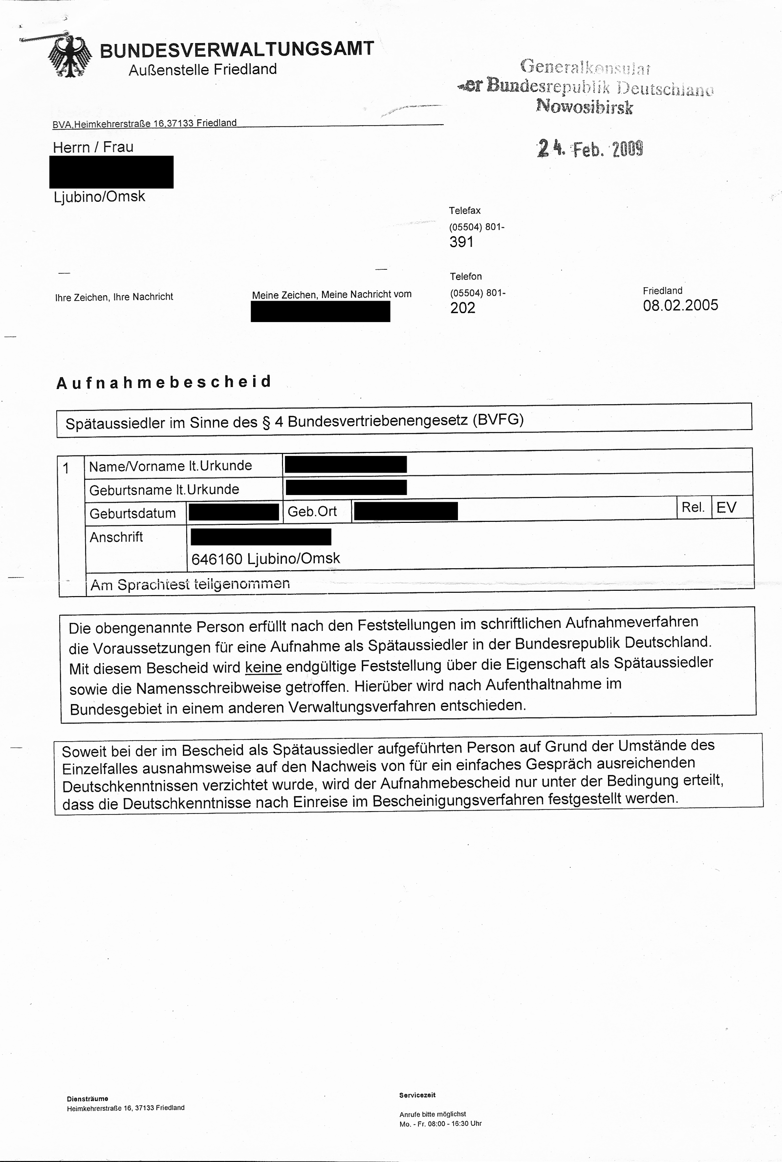 Свидетельство о приёме по Федеральному закону об изгнанных, выданное позднему переселенцу из России в 2005 году.